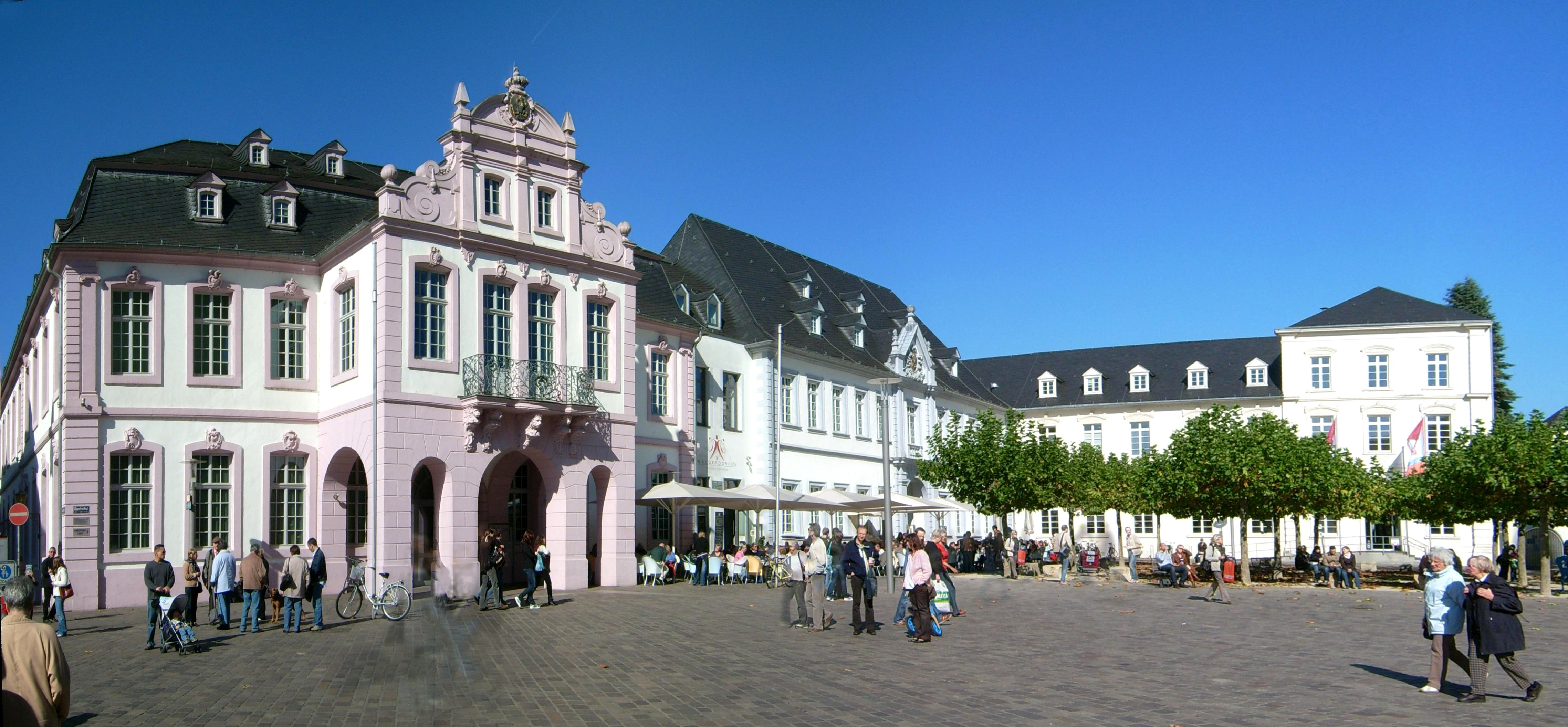 Trier Innenstadt, Domfreihof